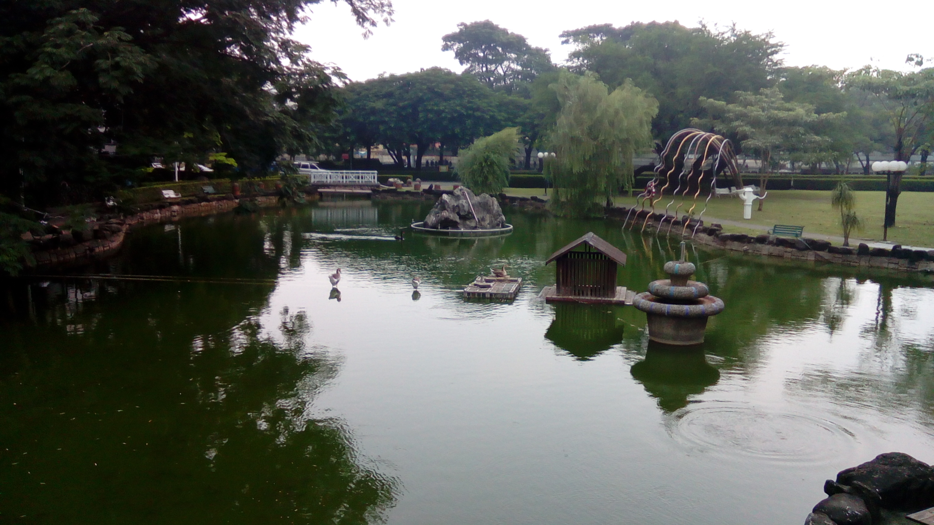 位於民生校區(原屏教大) 內有飼養魚類及雁鴨、天鵝